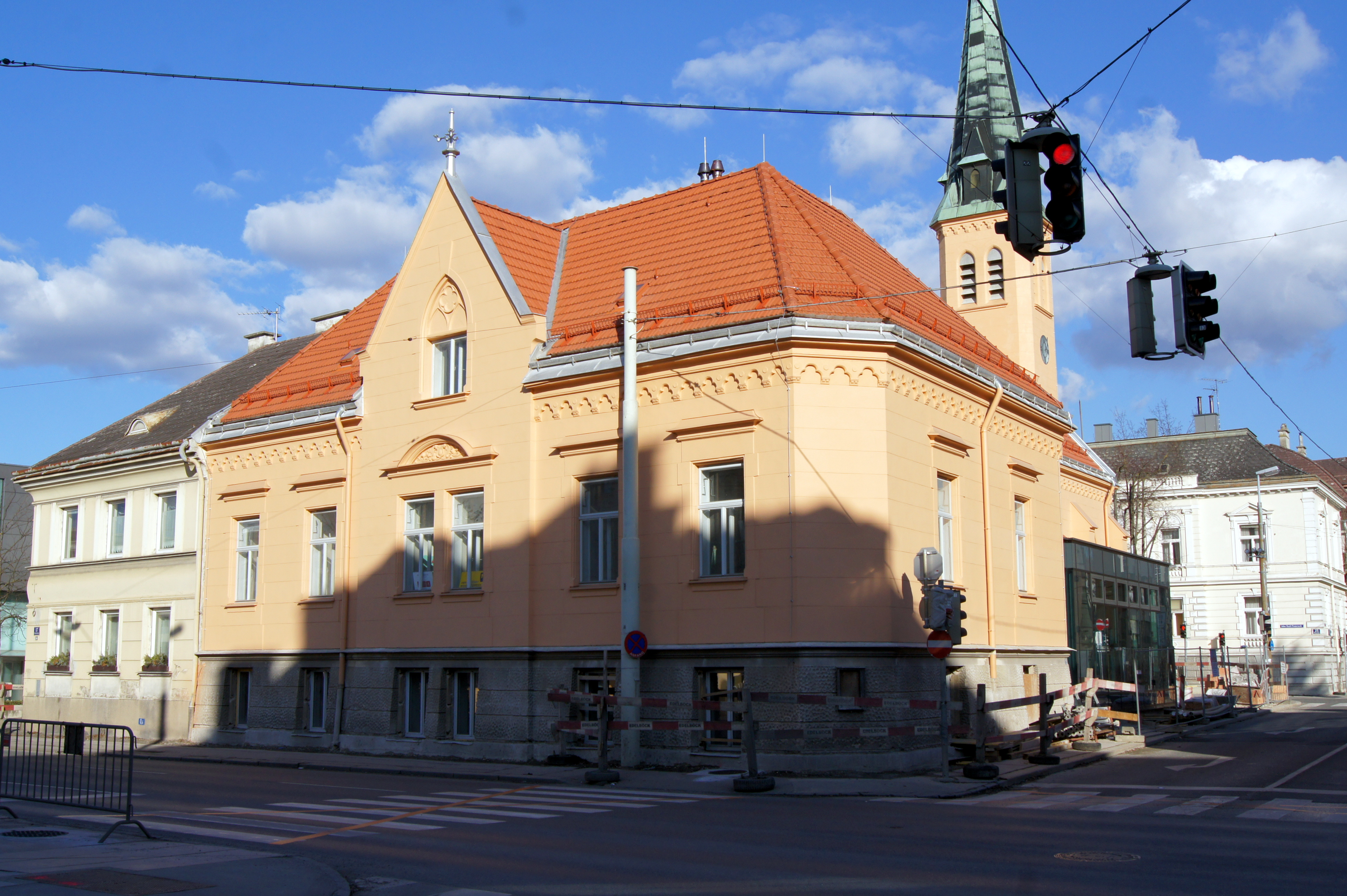 Evangelisches Pfarrhaus